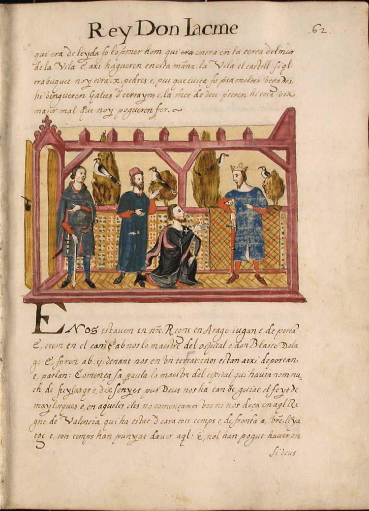 Libre dels Feyts